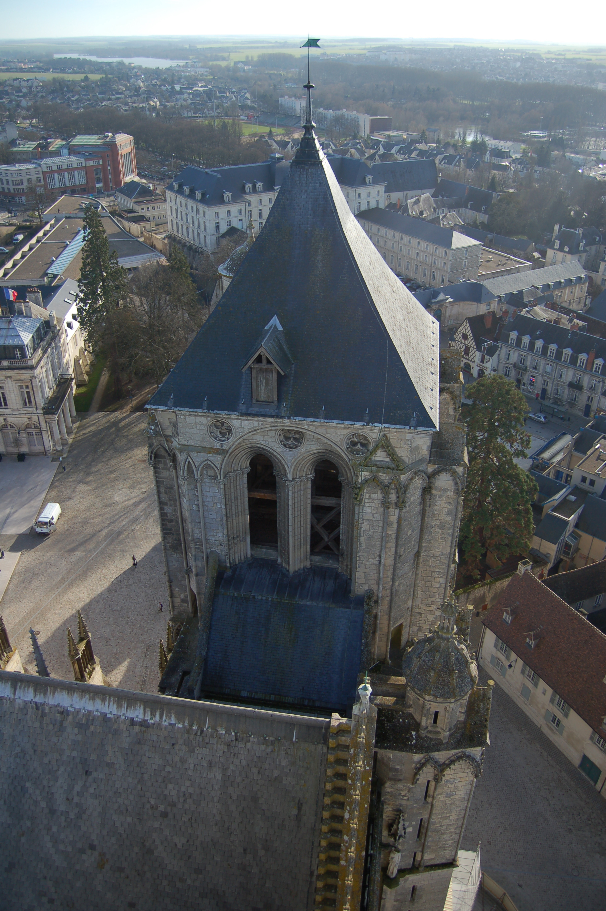 vue haute de la Cathédrale Saint-Étienne de Bourges